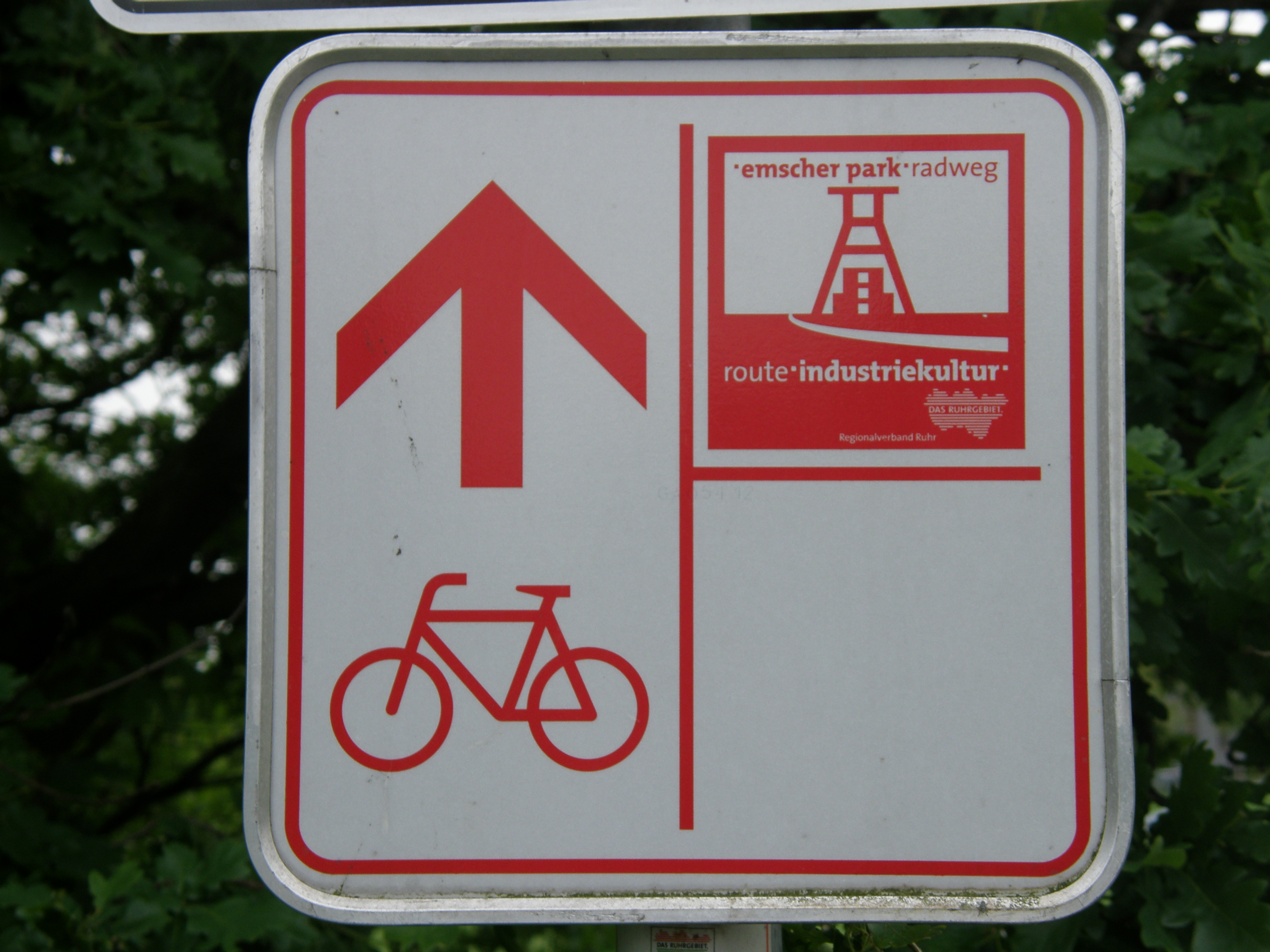 Typisches Streckenschild des Radweges "Emscher Park Radweg"